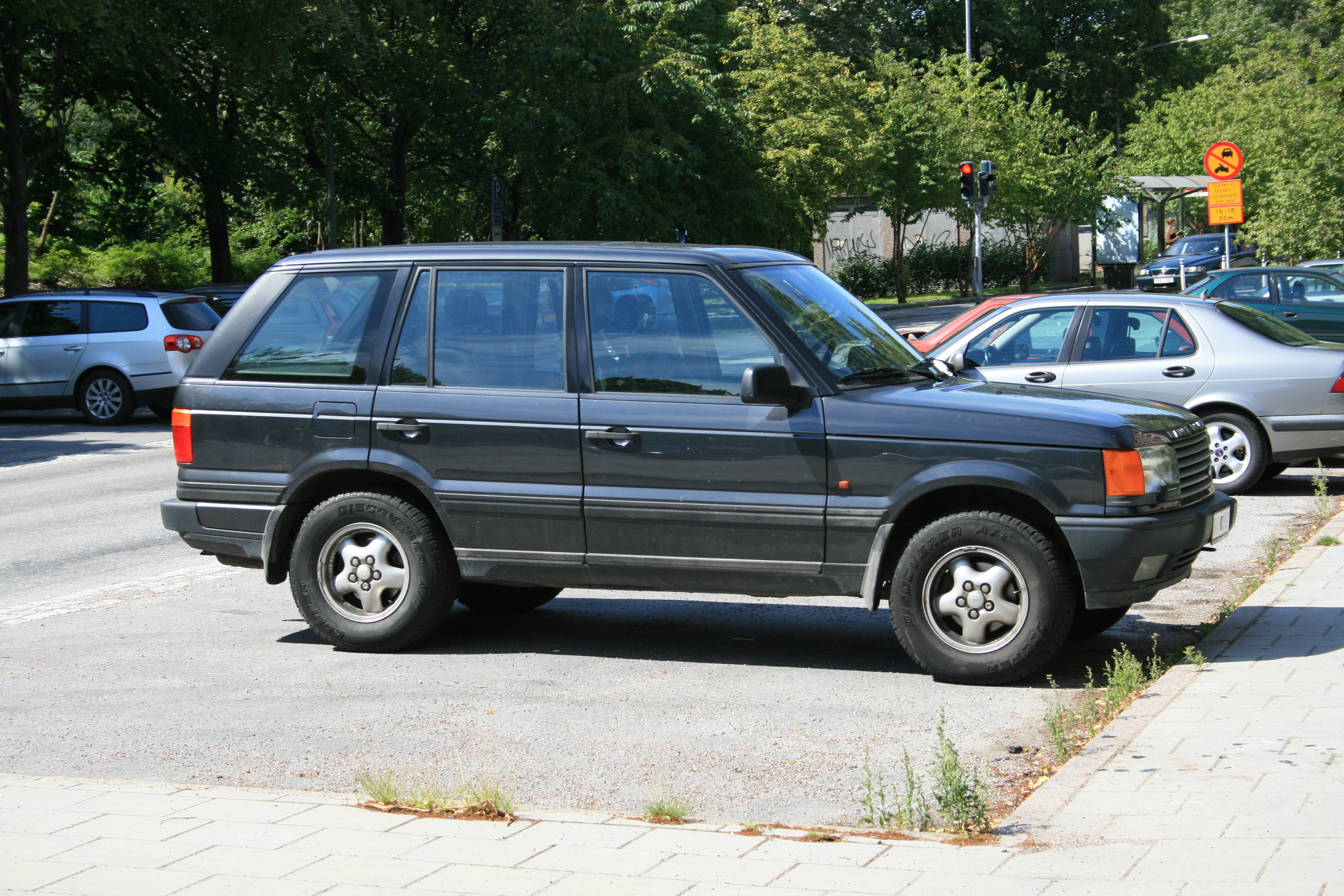 (Range Rover - P38)